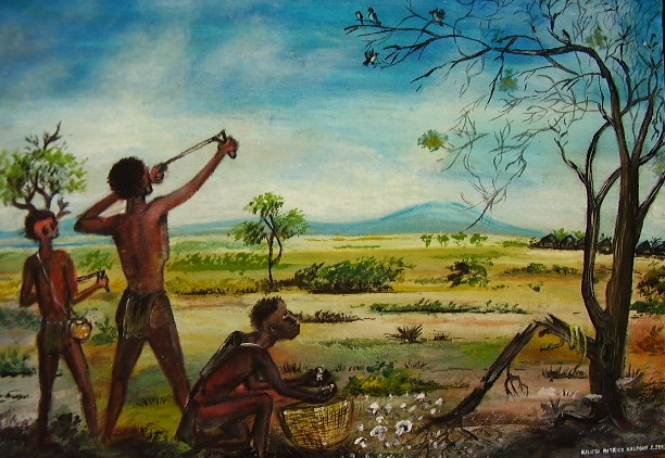 Ce tableau de peinture est l’œuvre de l'artiste congolais Patrick KALUTA KALPONE This is an image of Cultural Fashion or Adornment from Democratic Republic of the Congo